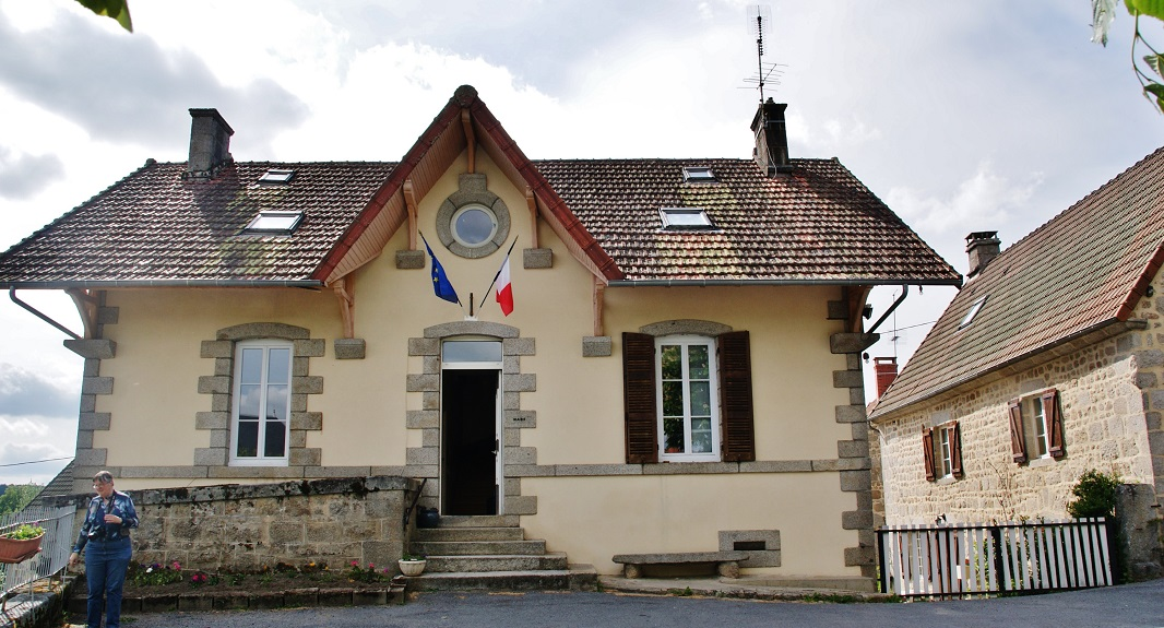 La Mairie